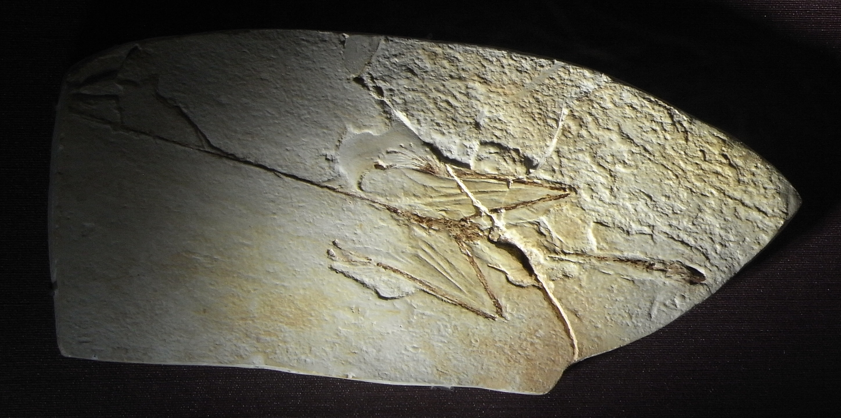 シャロヴィプテリクス。